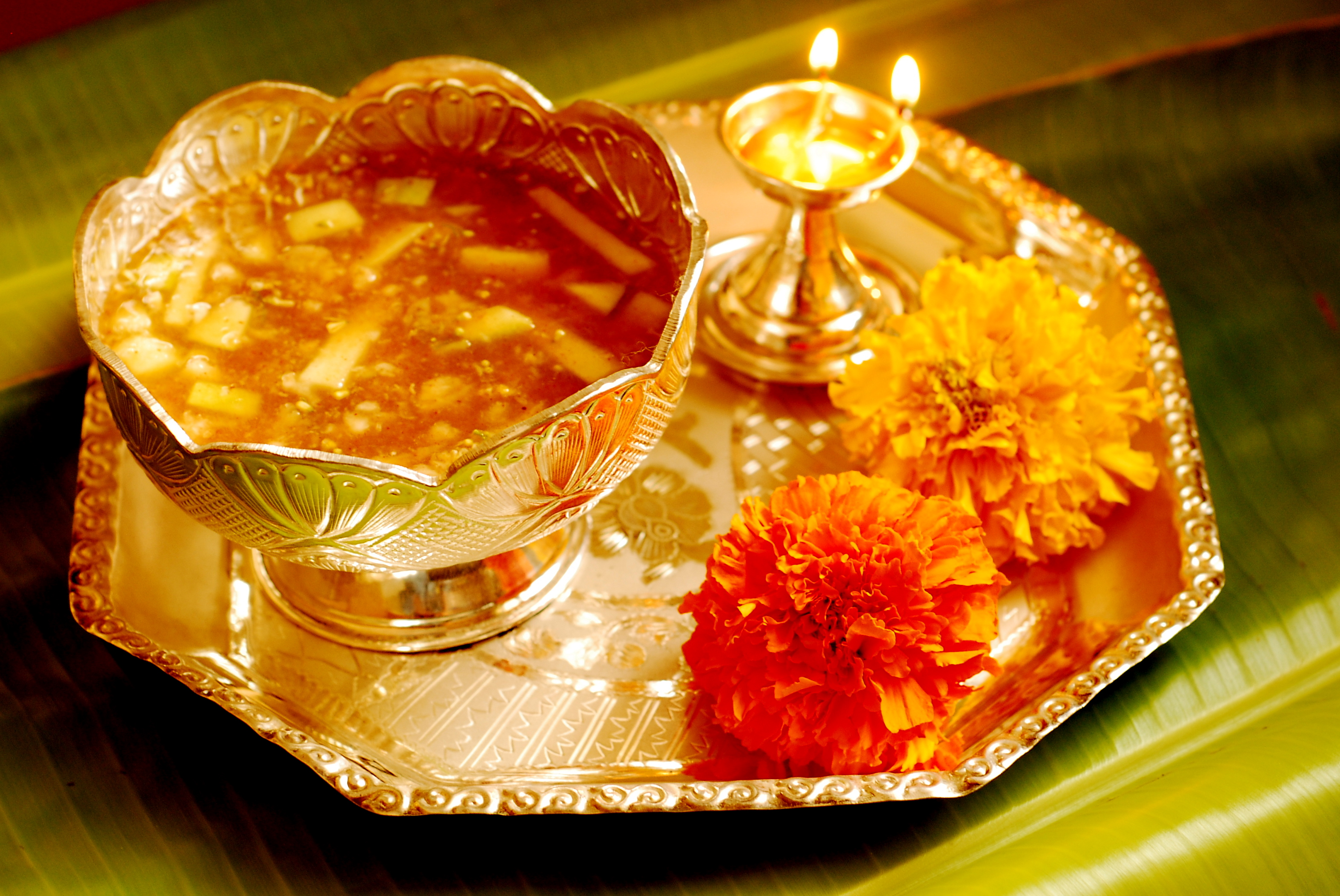 ugadi telugu andhra pachchadi new year vikruti nama samvatsaraadi వికృతి నామ సంవత్సర శుభాకాంక్షలు